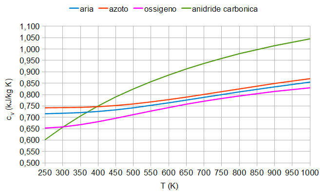 Si tratta del grafico dei calori specifici di gas perfetto a volume costante di azoto, ossigeno, aria e anidride carbonica.